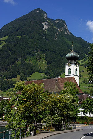 Kirche von Gersau (Nr. 03.1-8835)